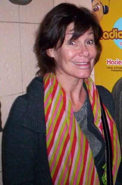 Coca Guazzini (2005)